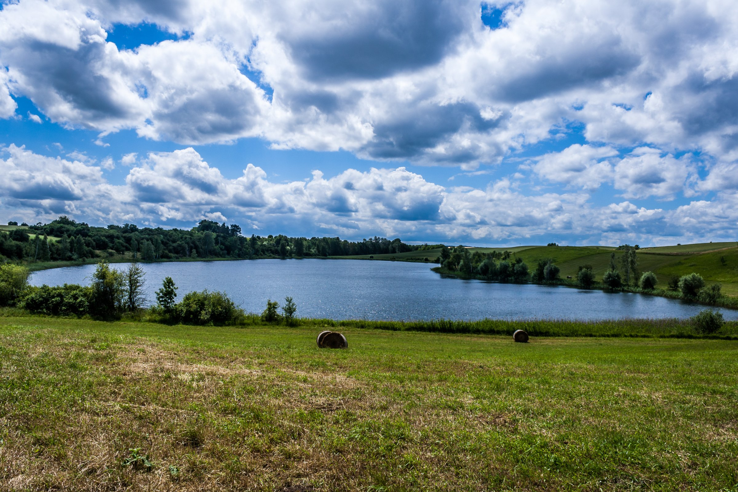 Tiefer See bei Bölkendorf